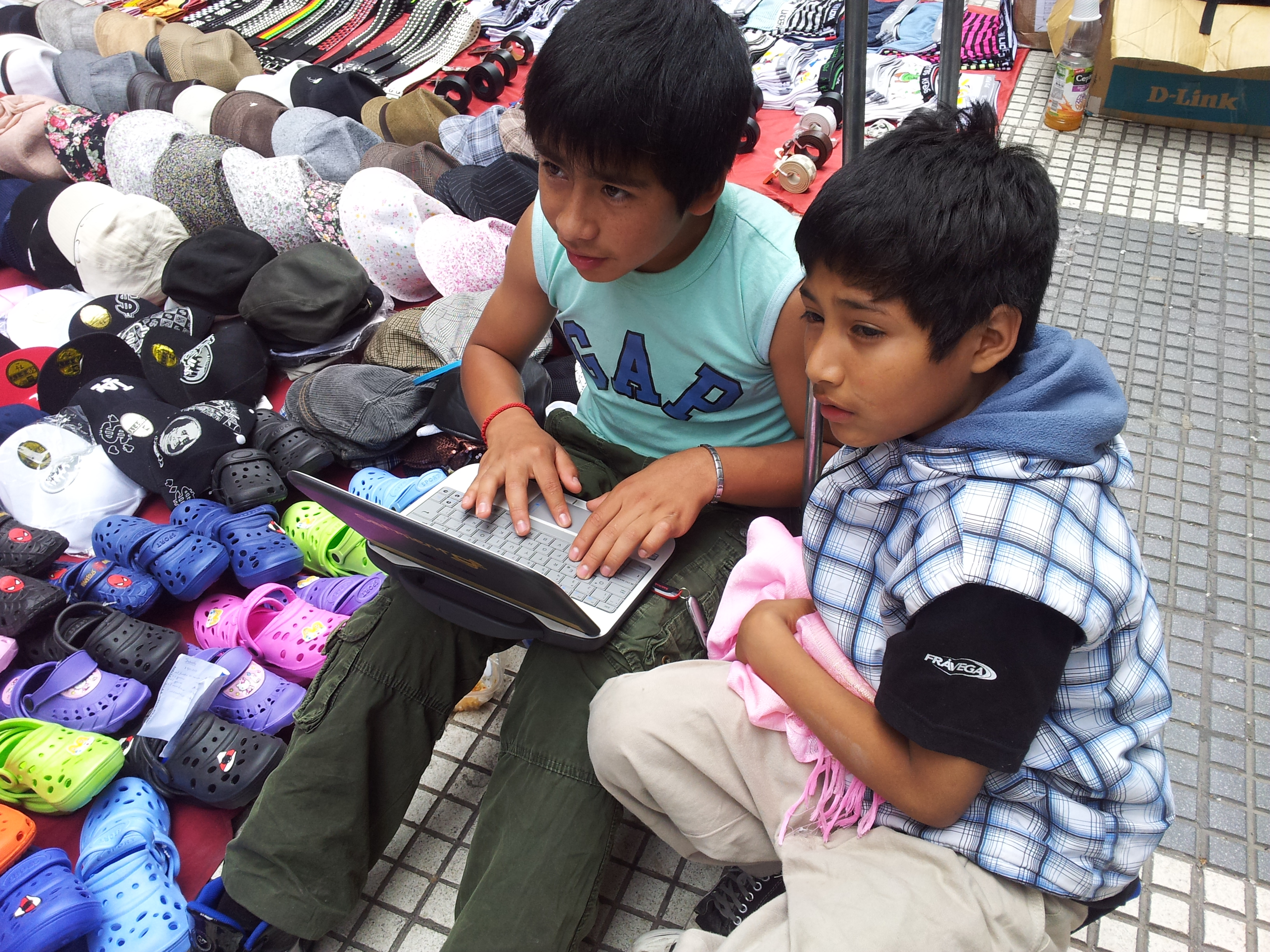 Dos niños manteros, vendiendo productos en la calle Florida, en Buenos Aires, Argentina